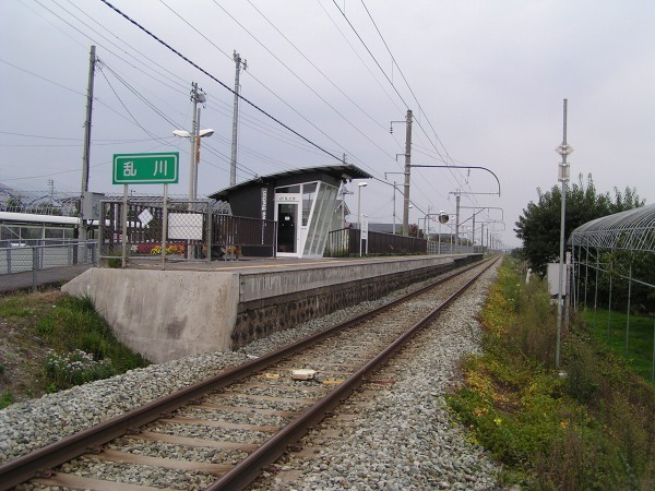 Midaregawa Station, Tendō, Yamagata, Japan